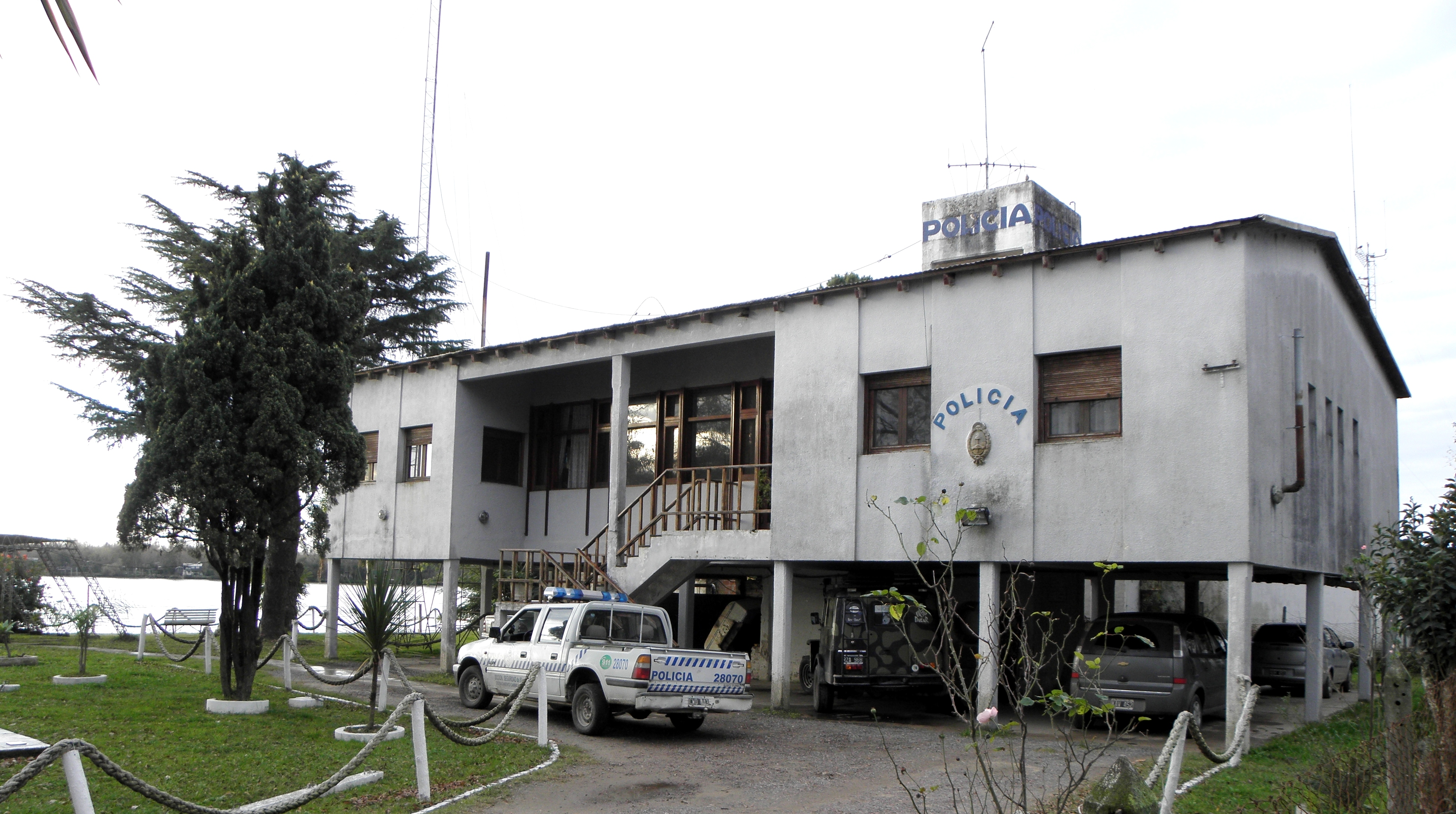 Puesto de la policía bonaerense en Puerto Paraná, en pleno delta del Paraná, sobre la ribera del río Paraná de las Palmas, partido de Escobar, en la zona nordeste de la provincia de Buenos Aires, centro-este de la Argentina.